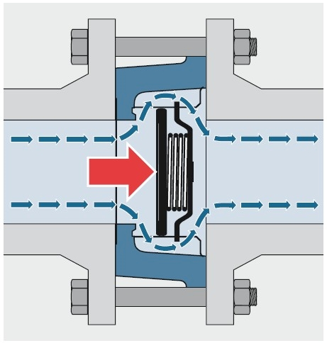 Принцип работы дискового пружинного клапана